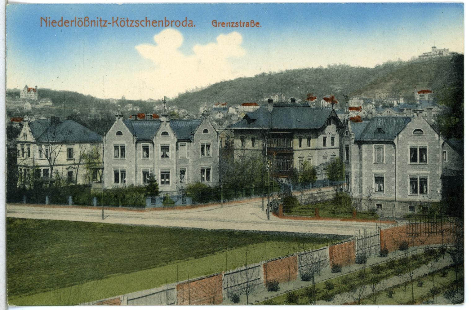 Radebeul; Grenzstraße This postcard is from publisher Brück & Sohn in Meißen ( postcard has a unique number 14447 and is available in a higher resolution at the publisher. This images was uploaded in a cooperation project between Wikipedians and the publisher.